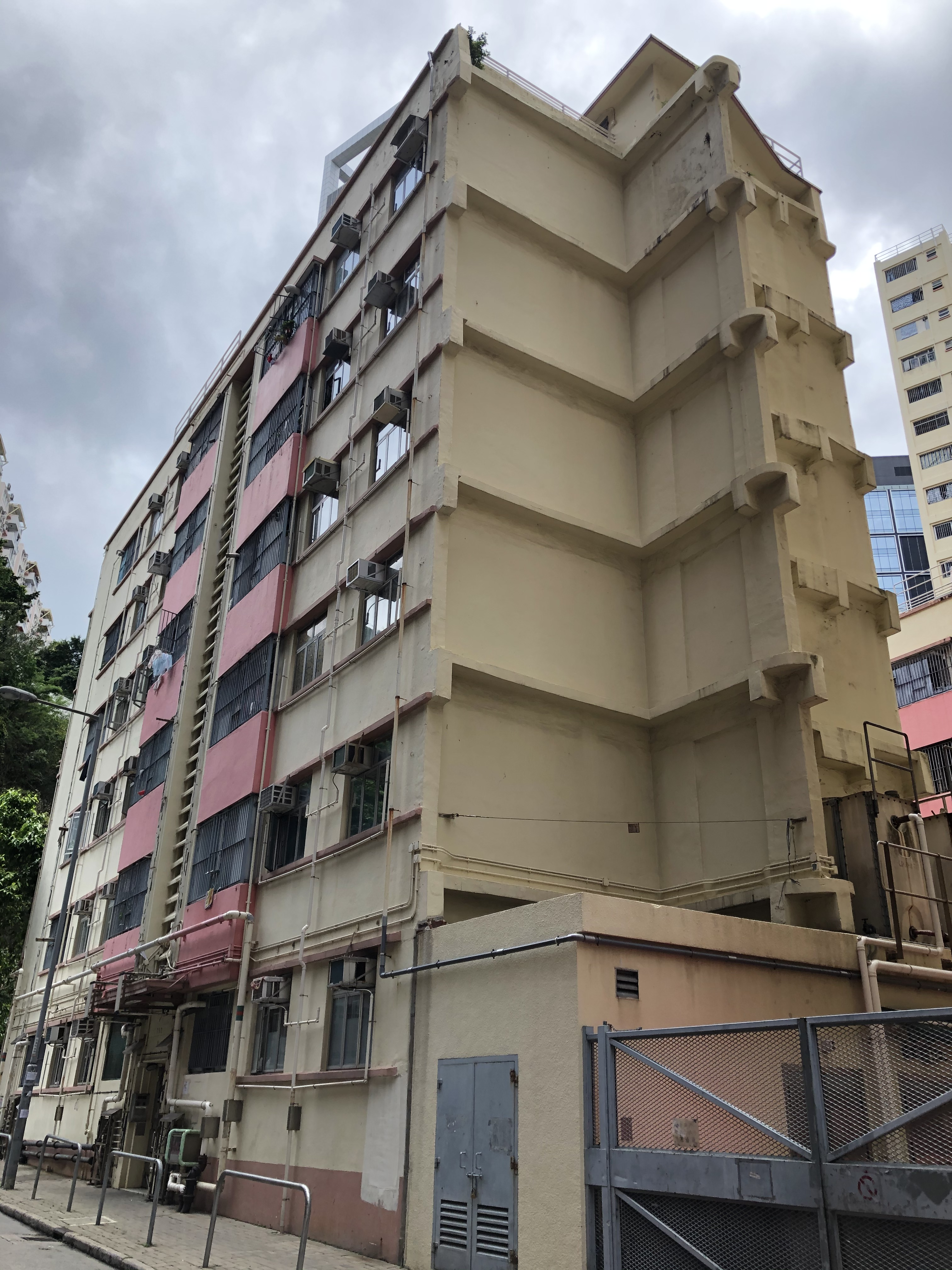 中文（香港）: 鰂魚涌模範邨A座側面，可見因重建而被拆卸半座後的痕跡。